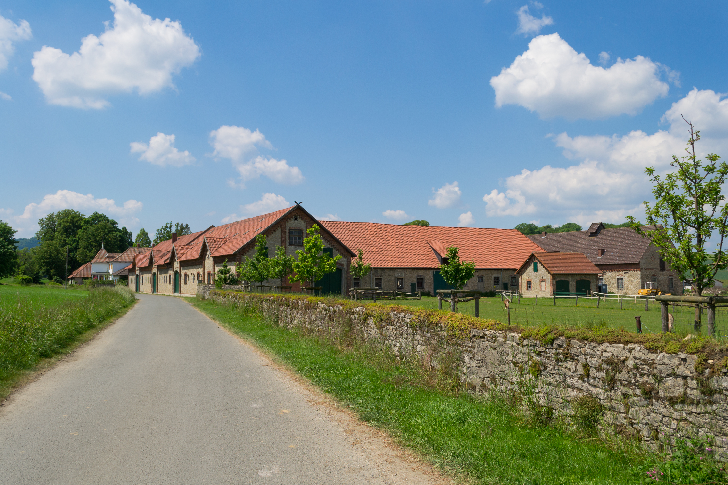 Gut Hornoldendorf